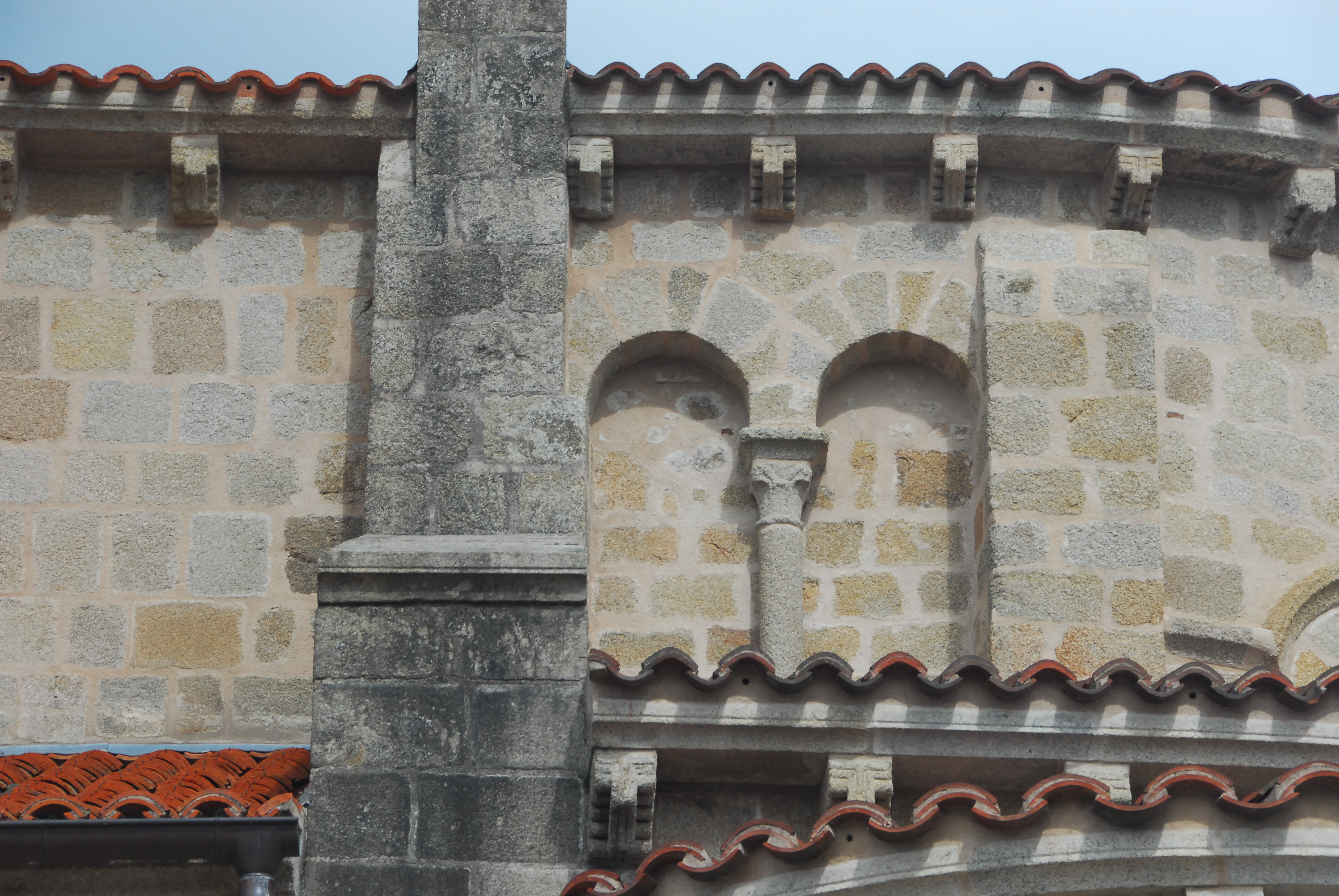 N.-D. de Châtel-Montagne, Detail südl. Chorwand